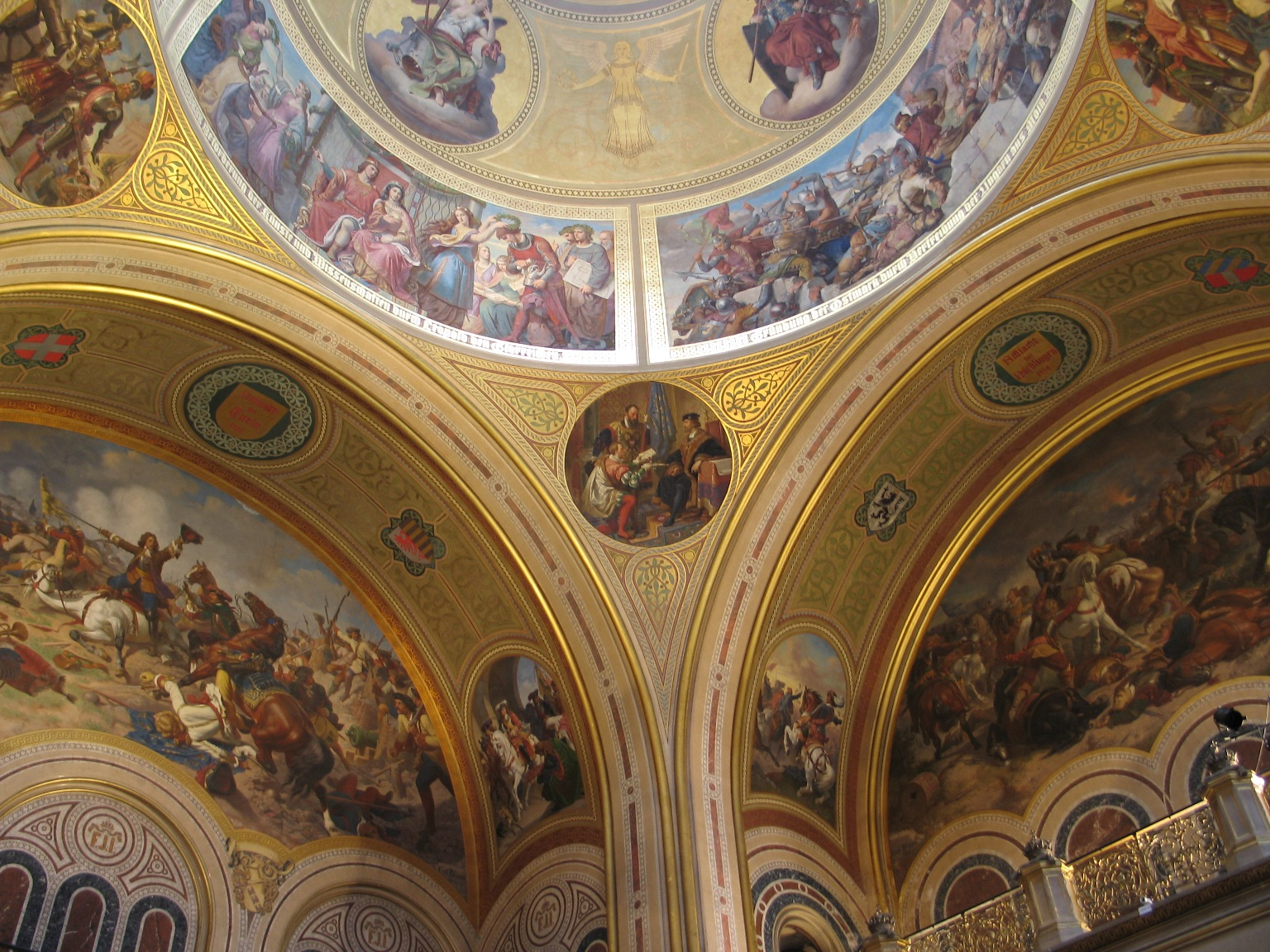 Fresken in der Ruhmeshalles des Heeresgeschichtlichen Museums